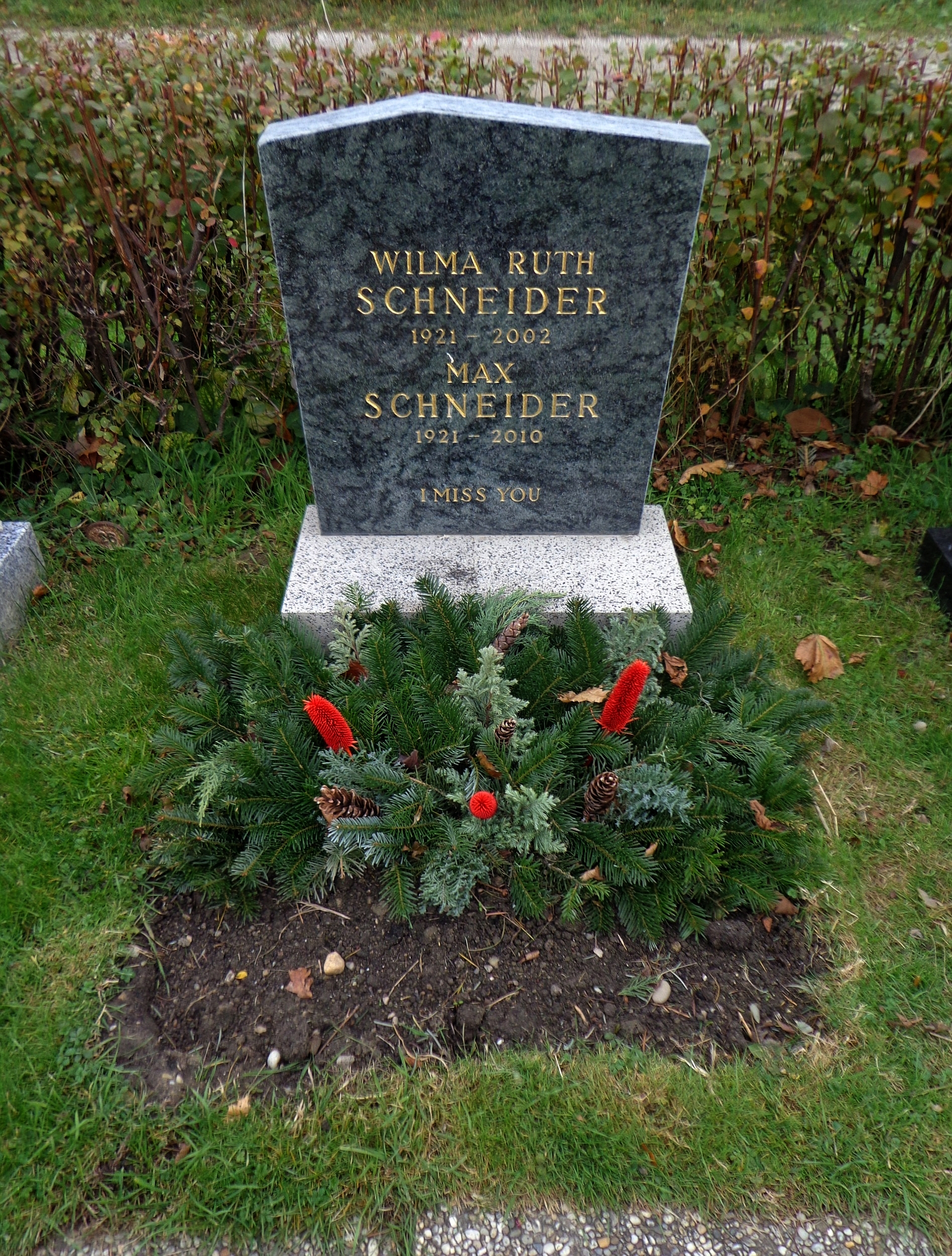 Feuerhalle Simmering - Abteilung E19 (Urnenhain-Erweiterung, Erdgräber): Grab des KPÖ-Politikers und Zeitzeugen Max Schneider (1921-2010)